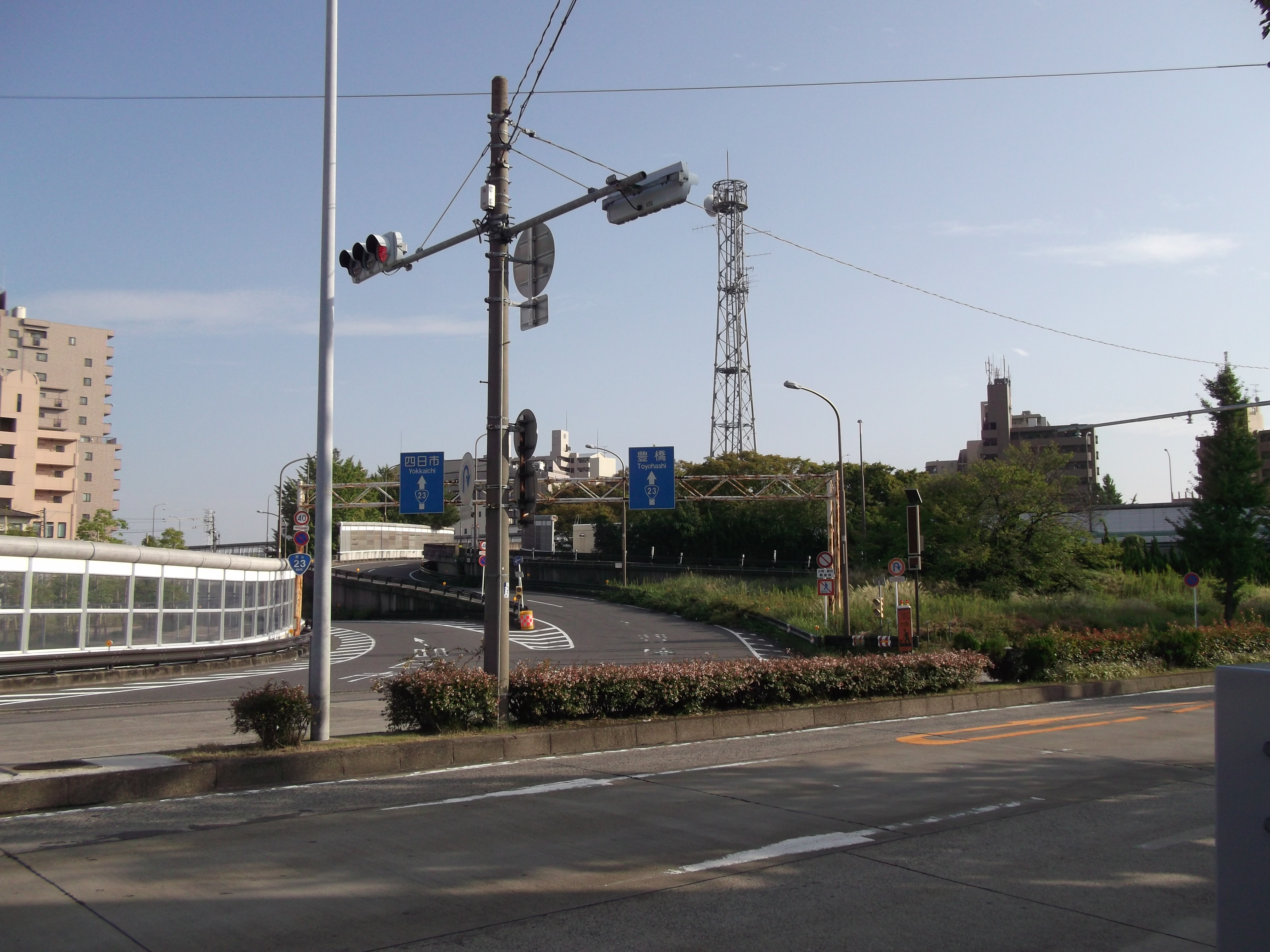 名古屋市港区の国道23号（名四国道）港陽インターチェンジを北西から撮影